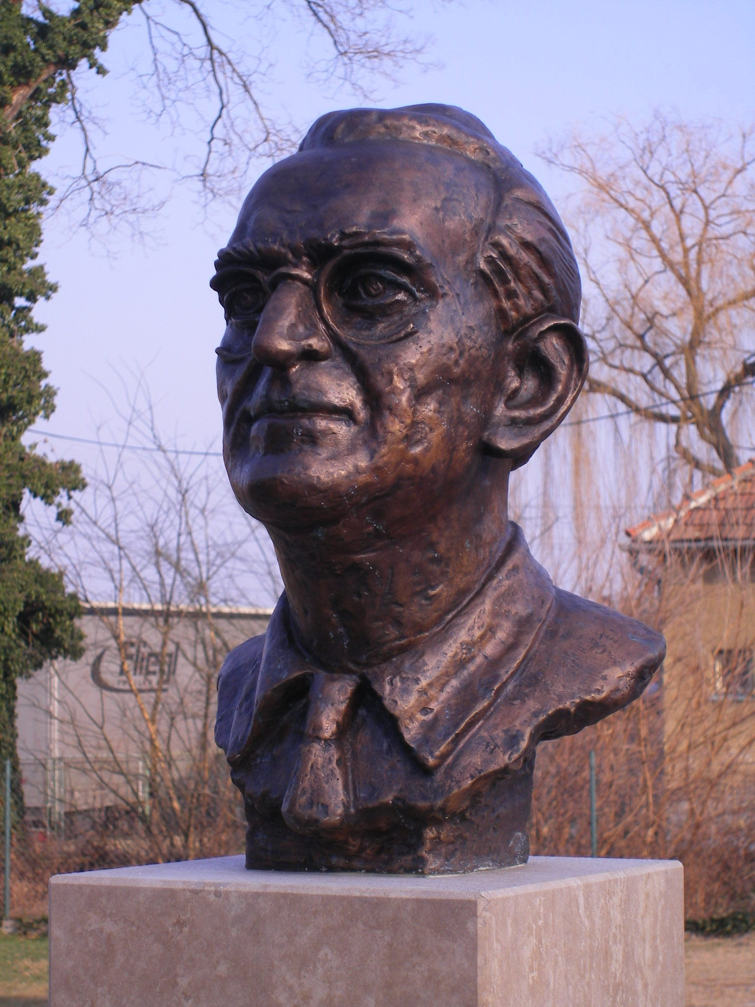 Dunamocs - Nehéz Ferenc mellszobra